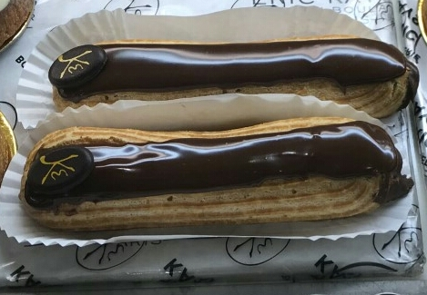 Deux éclairs au chocolat dans une boulangerie-pâtisserie parisienne.